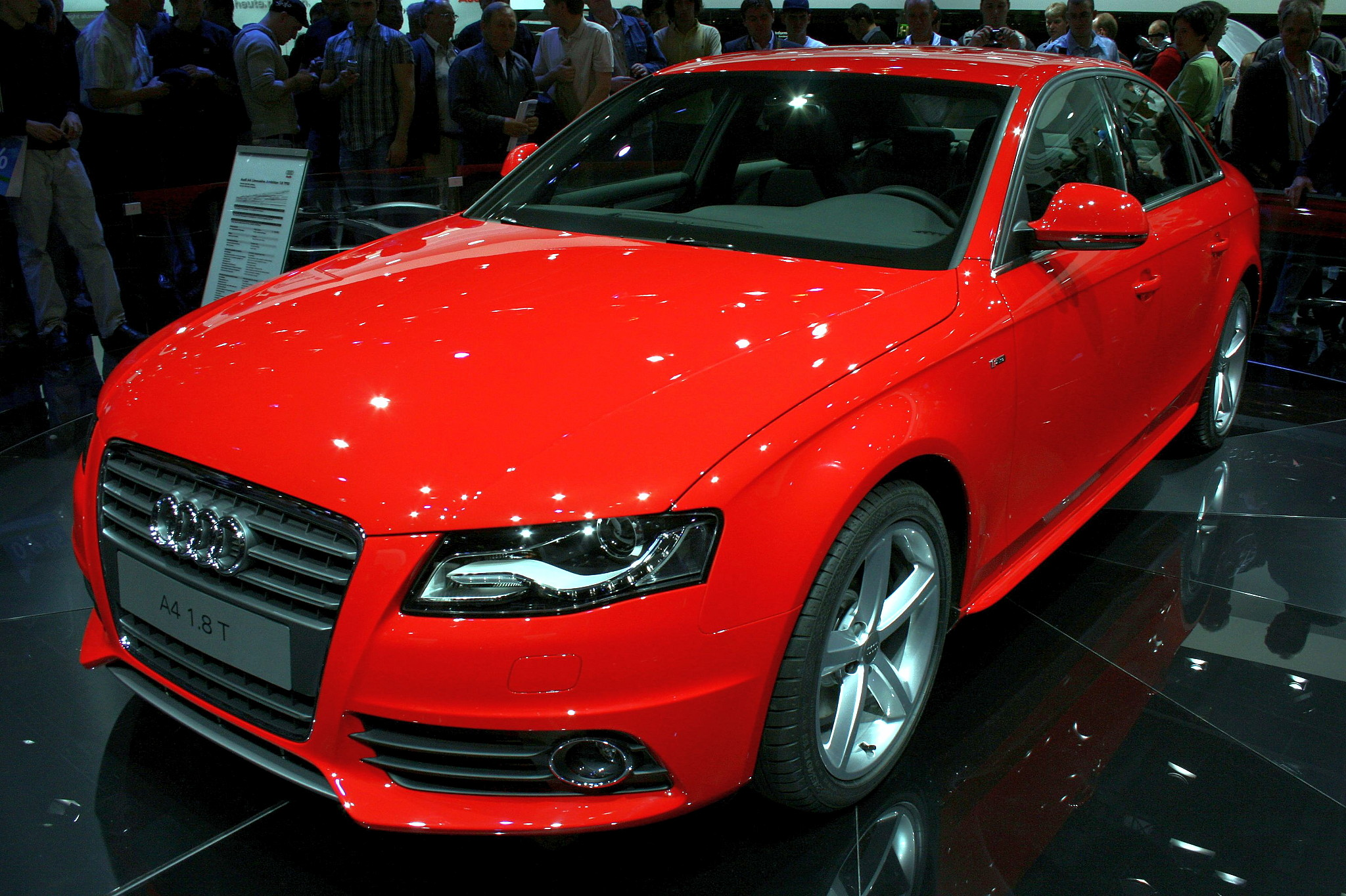 die neue Audi A4 Limousine auf der IAA 2007